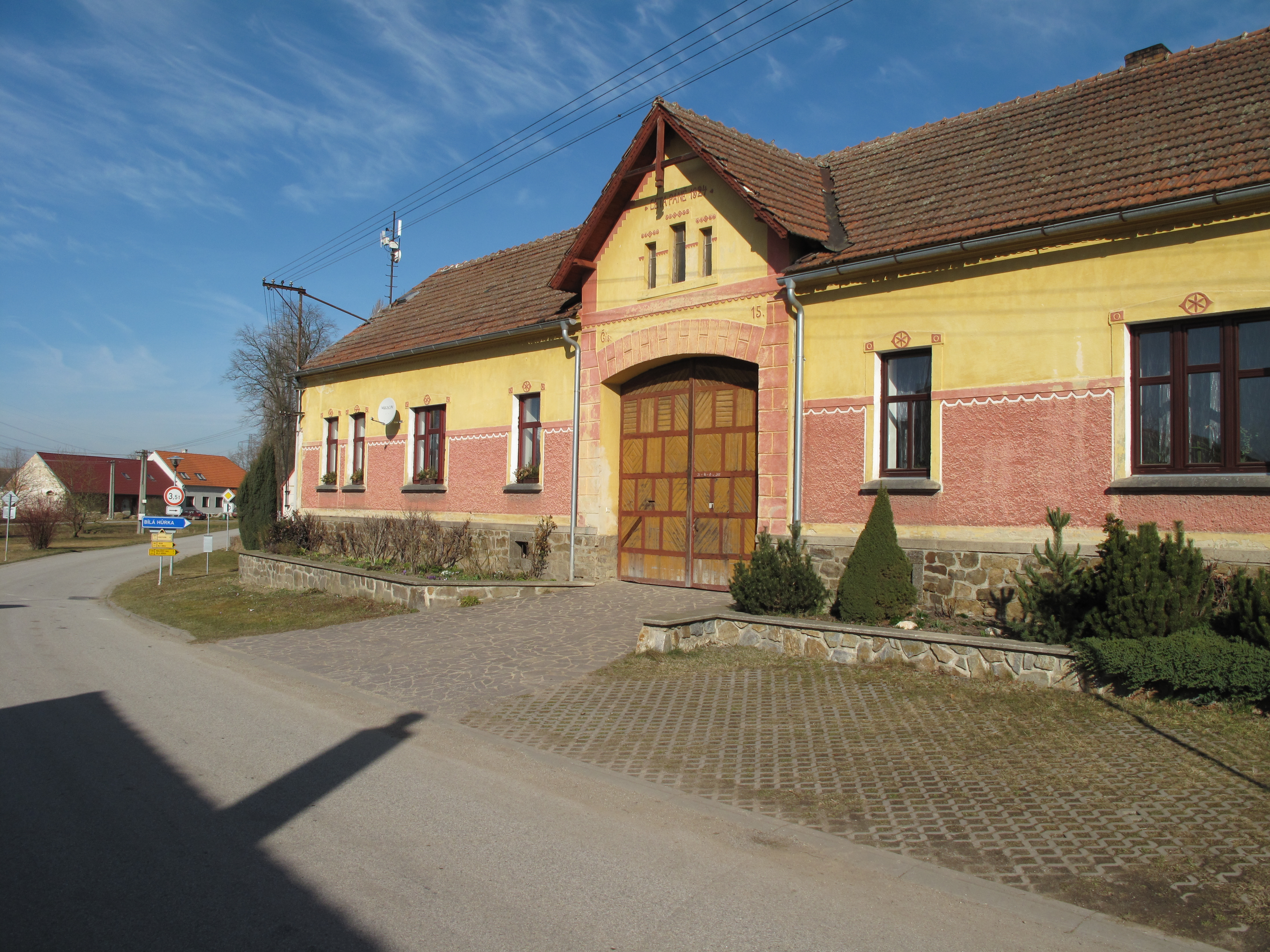 Dům ve Strachovicích. Okres České Budějovice, Česká republika.